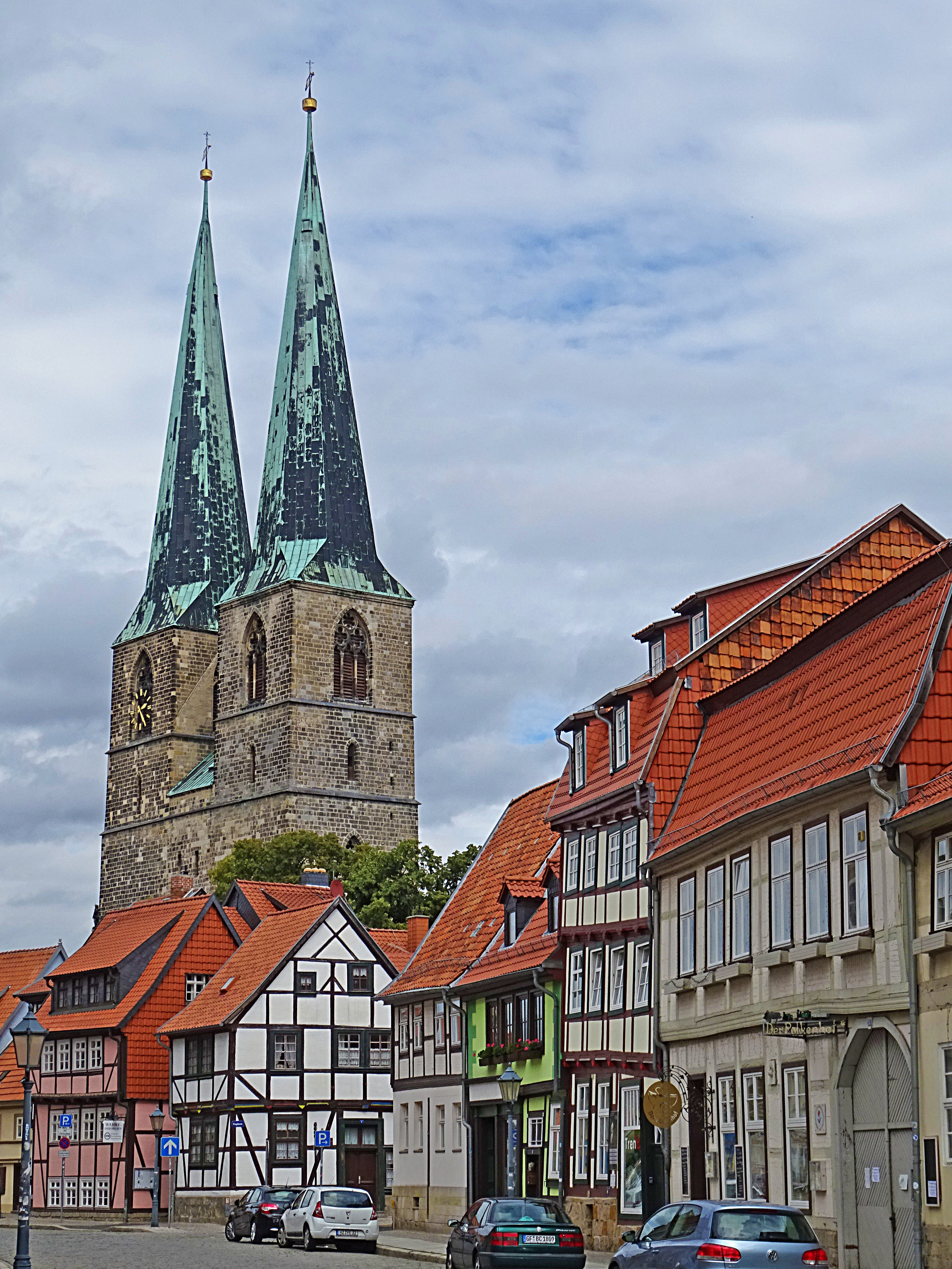 Pfarrkirche St. Nikolai (Quedlinburg) von Südwesten